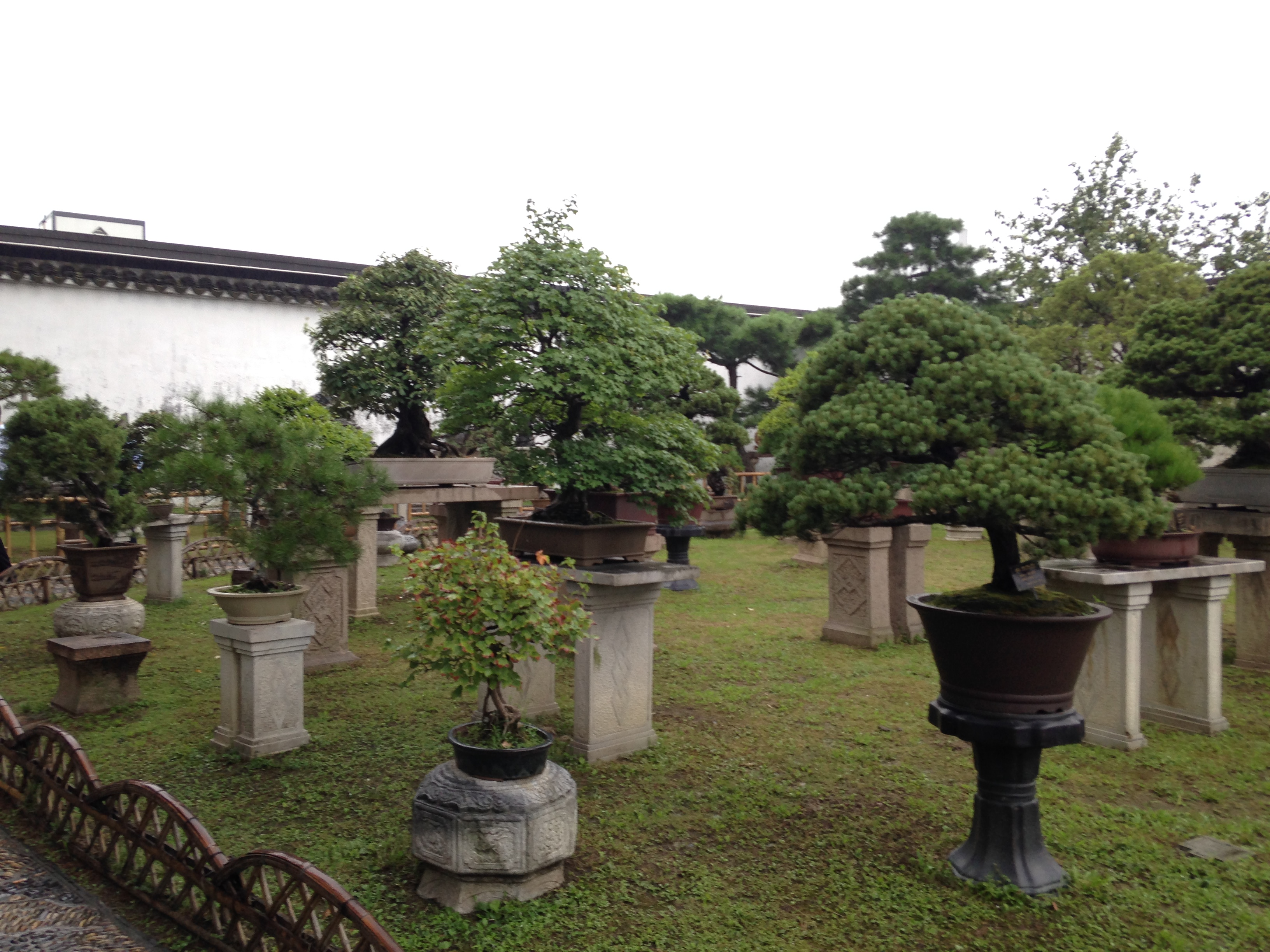 拙政園の盆栽